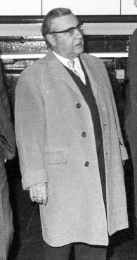 Lok Nr. 290 238-5. Vorn v.l. MaK-Geschäftsführer Dr. Schiffbauer (vermutlich), der Vorstandsvorsitzende der Bundesbahn, Prof. Dr. Dr.-Ing. Heinz Maria Oeftering, Landeswirtschaftsminister Dr. Karl Heinz Narjes und MaK-Direktor Dr. Holtmeier (vermutlich).